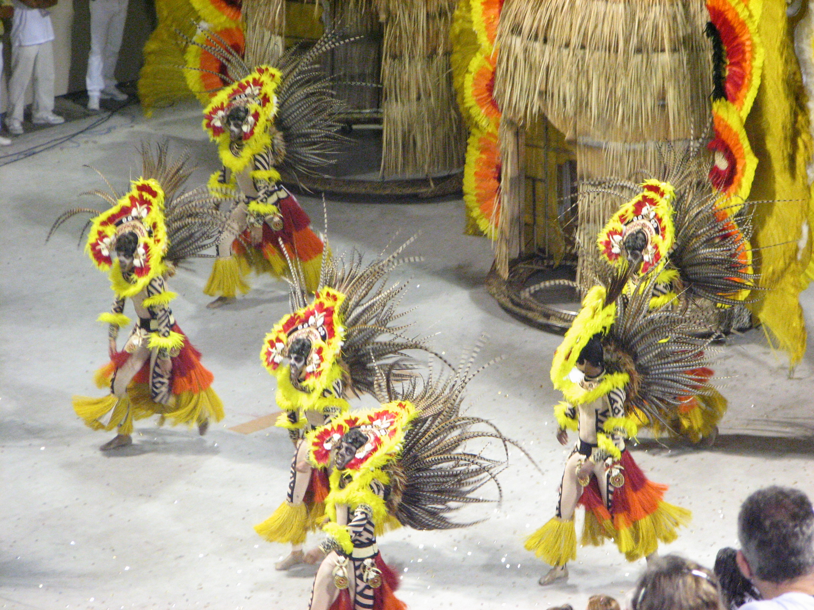 Brazilian Carnival parade in Rio de Janeiro.